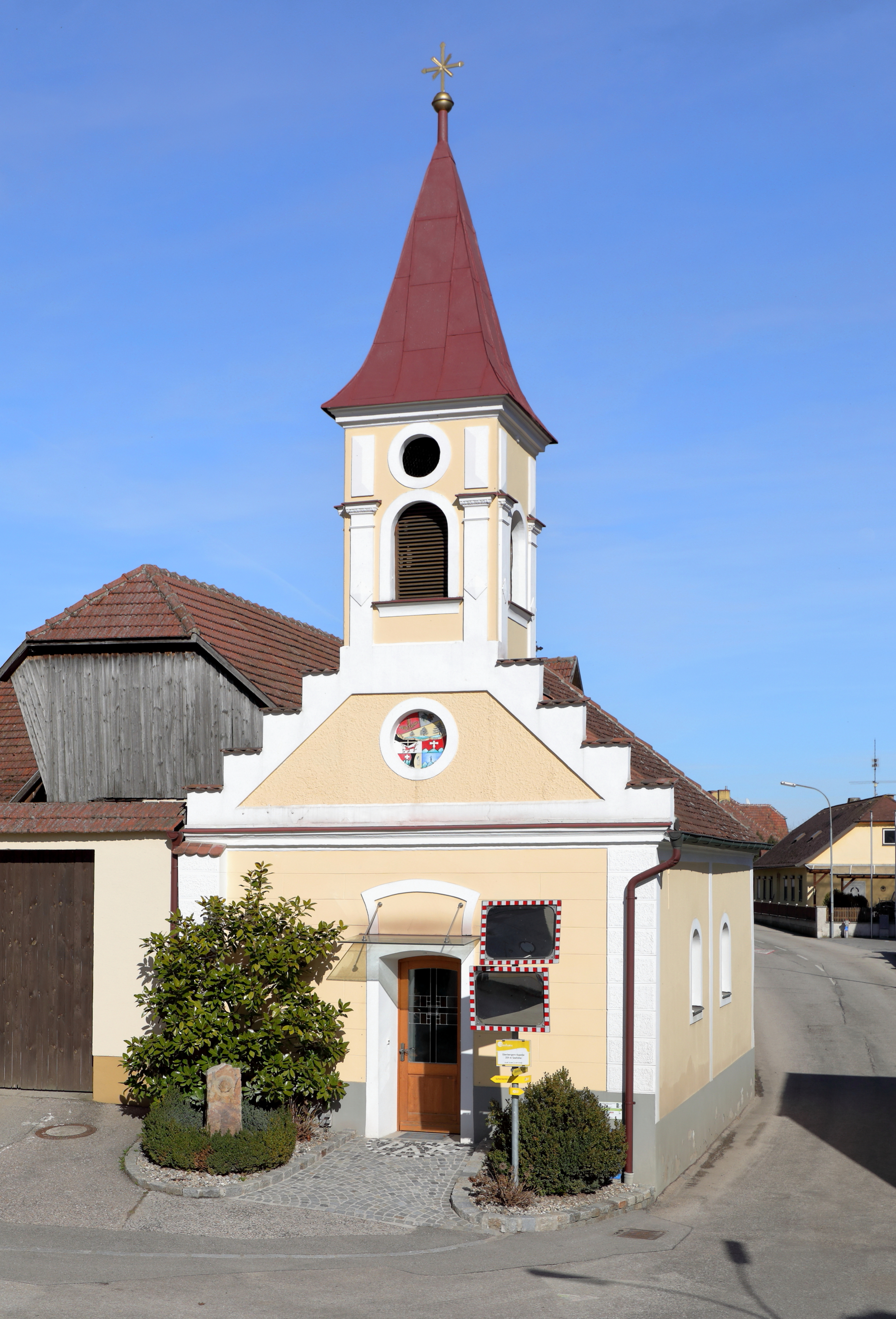 Westansicht der Ortskapelle von Oberbergern, ein Ortsteil der niederösterreichischen Gemeinde Bergern im Dunkelsteinerwald. Ein Rechteckbau mit eingezogener Apsis in der Ortsmitte, der 1763 von Johann Schwerdtfeger errichtet wurde.